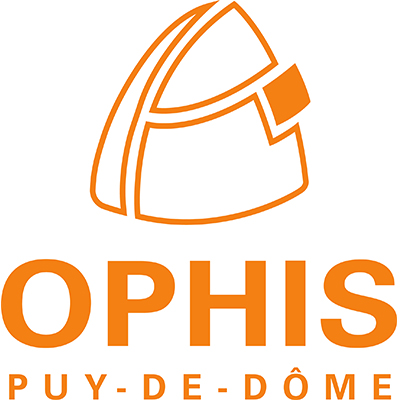 logo Ophis 2020